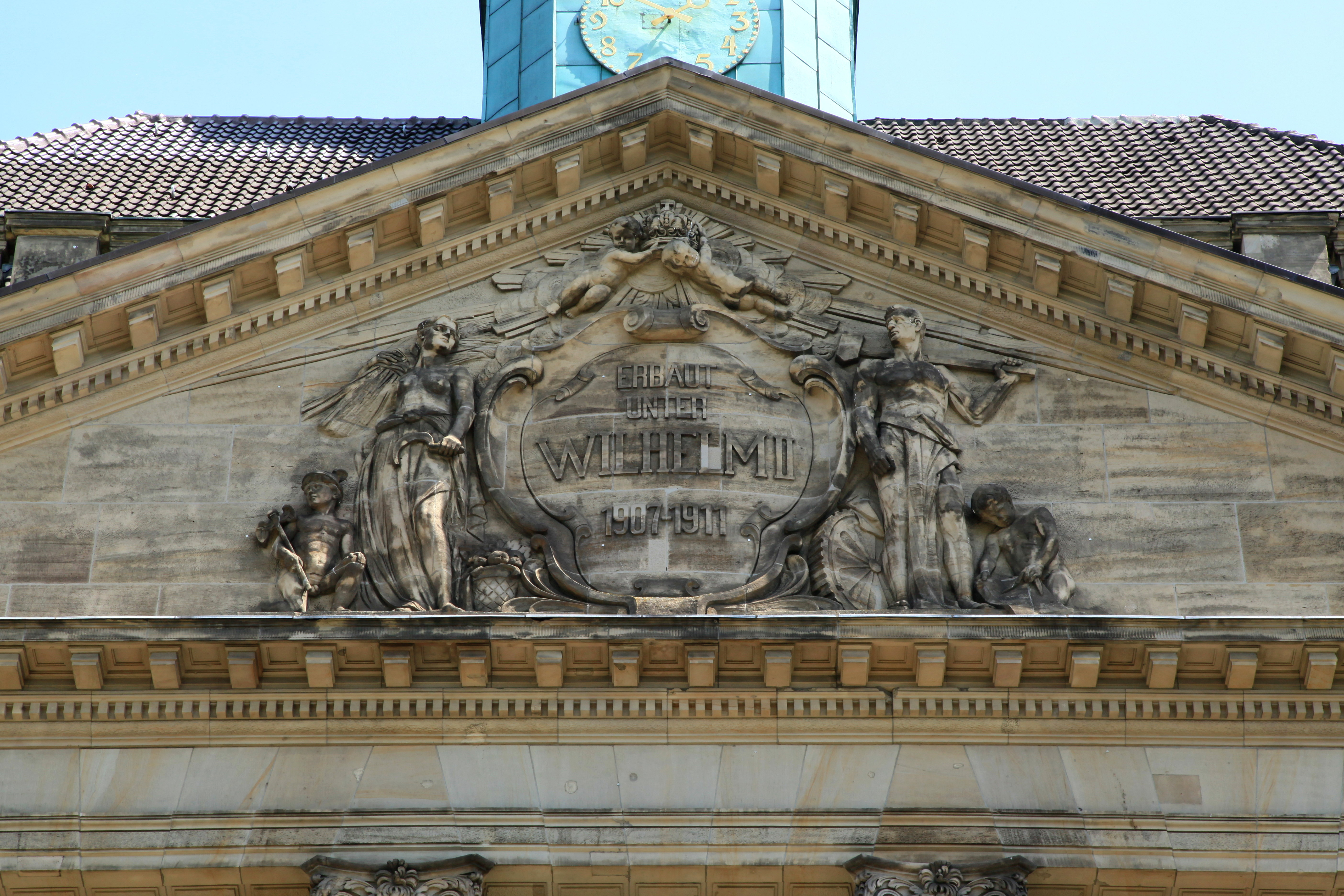 Bezirksregierung, Cecilienallee 1–2 in Düsseldorf